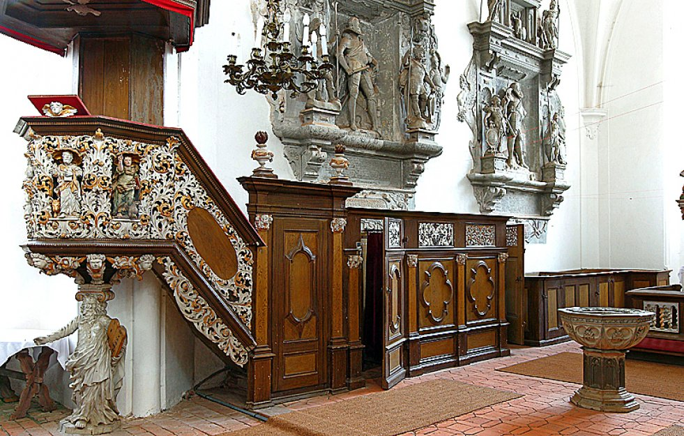 Beichtstuhl